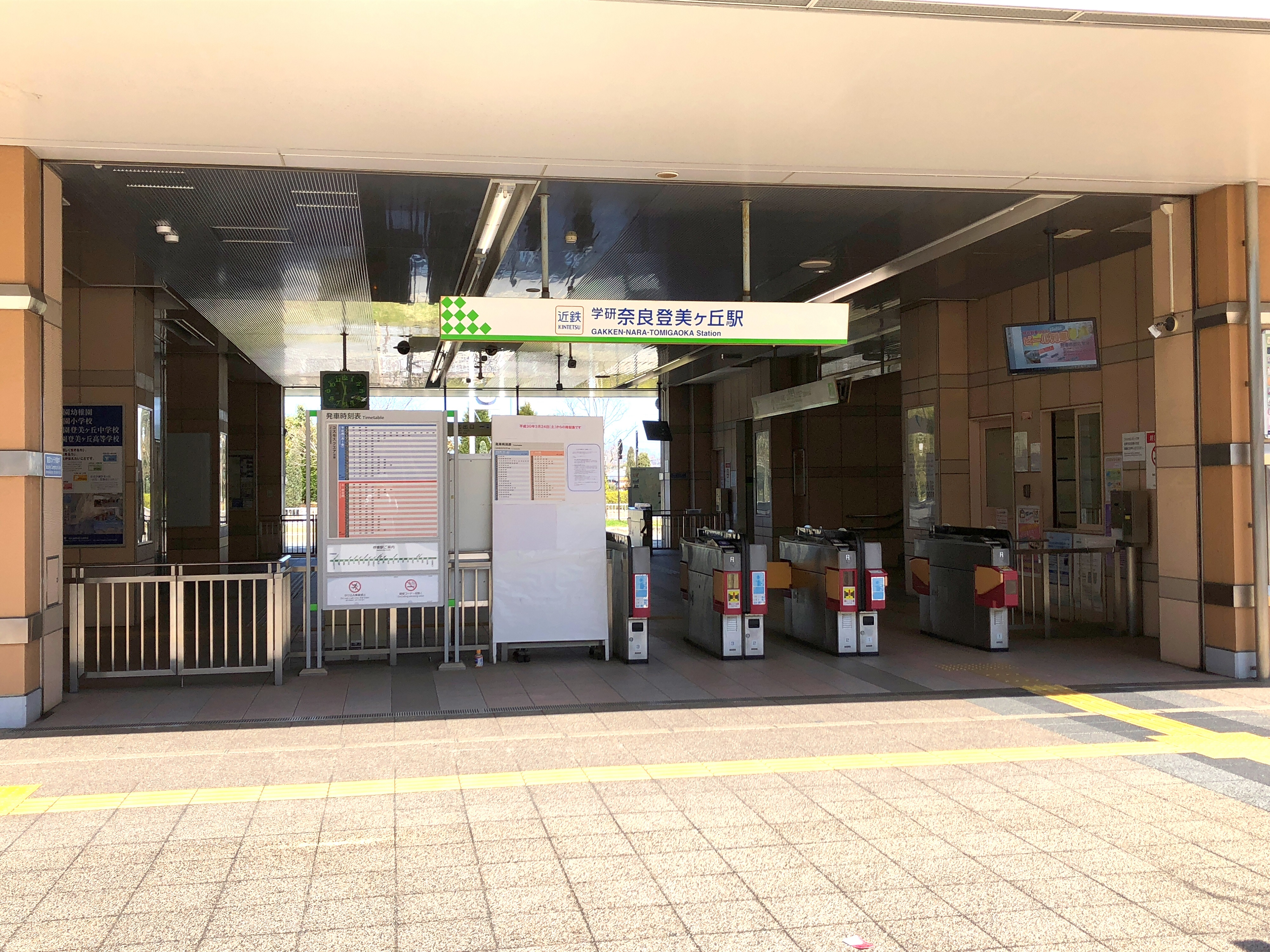 南口改札です。